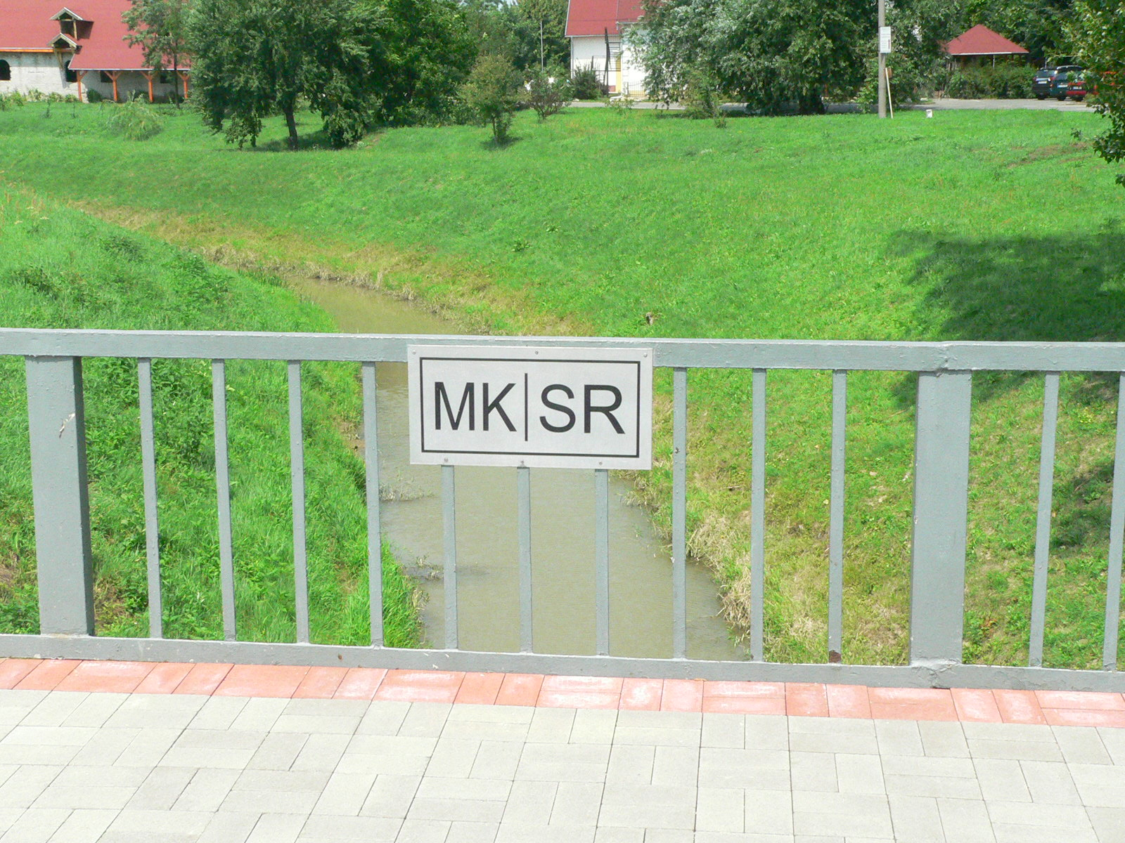 A „hajózható határfolyó” – a Ronyva patak Sátoraljaújhely és Újhely között